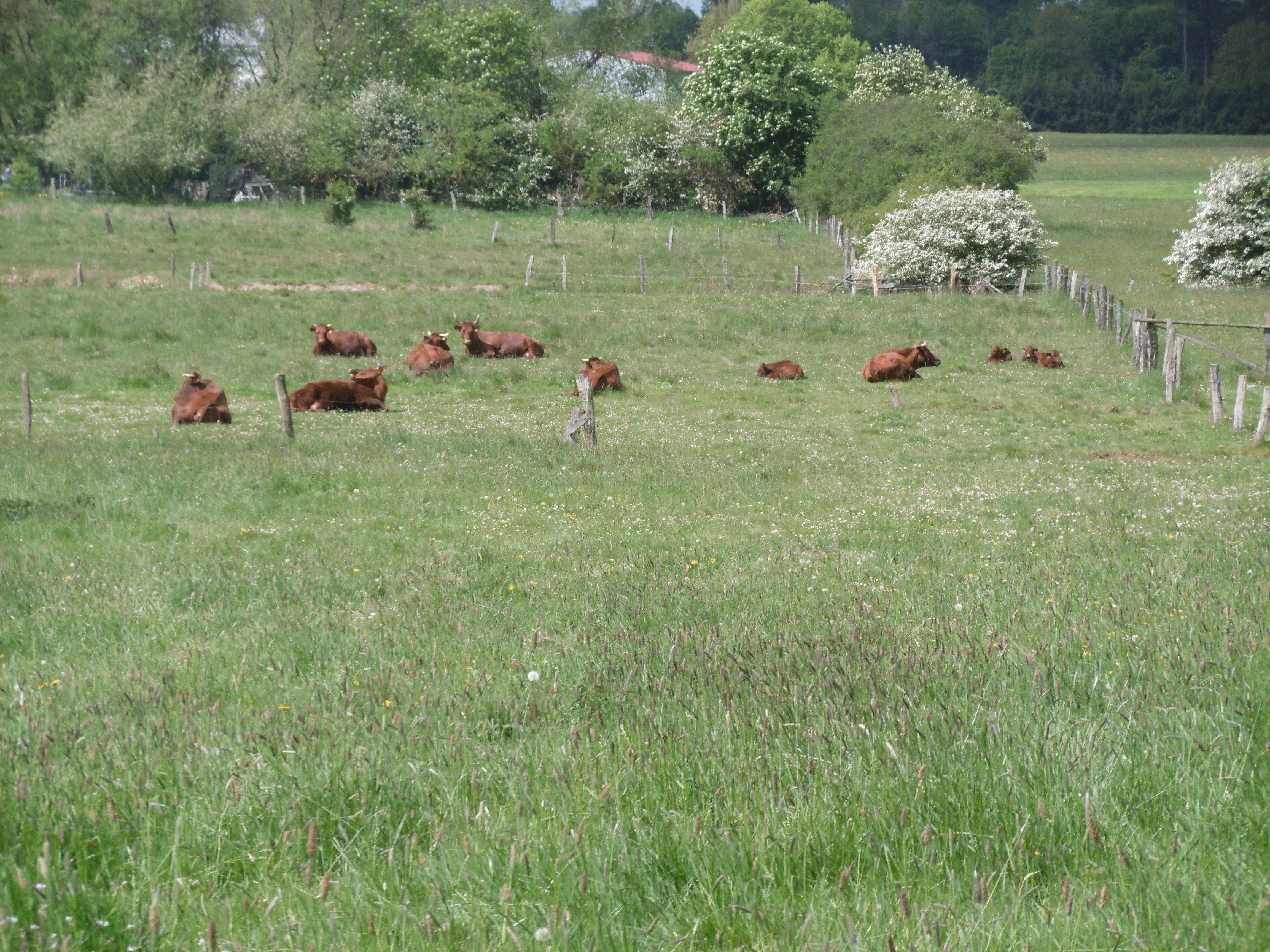 Rotes Höhenvieh des "Verein für Natur- und Vogelschutz im Hochsauerlandkreis" im Naturschutzgebiet Auf dem Bruch westlich Marsberg-Essentho, Hochsauerlandkreis, NRW